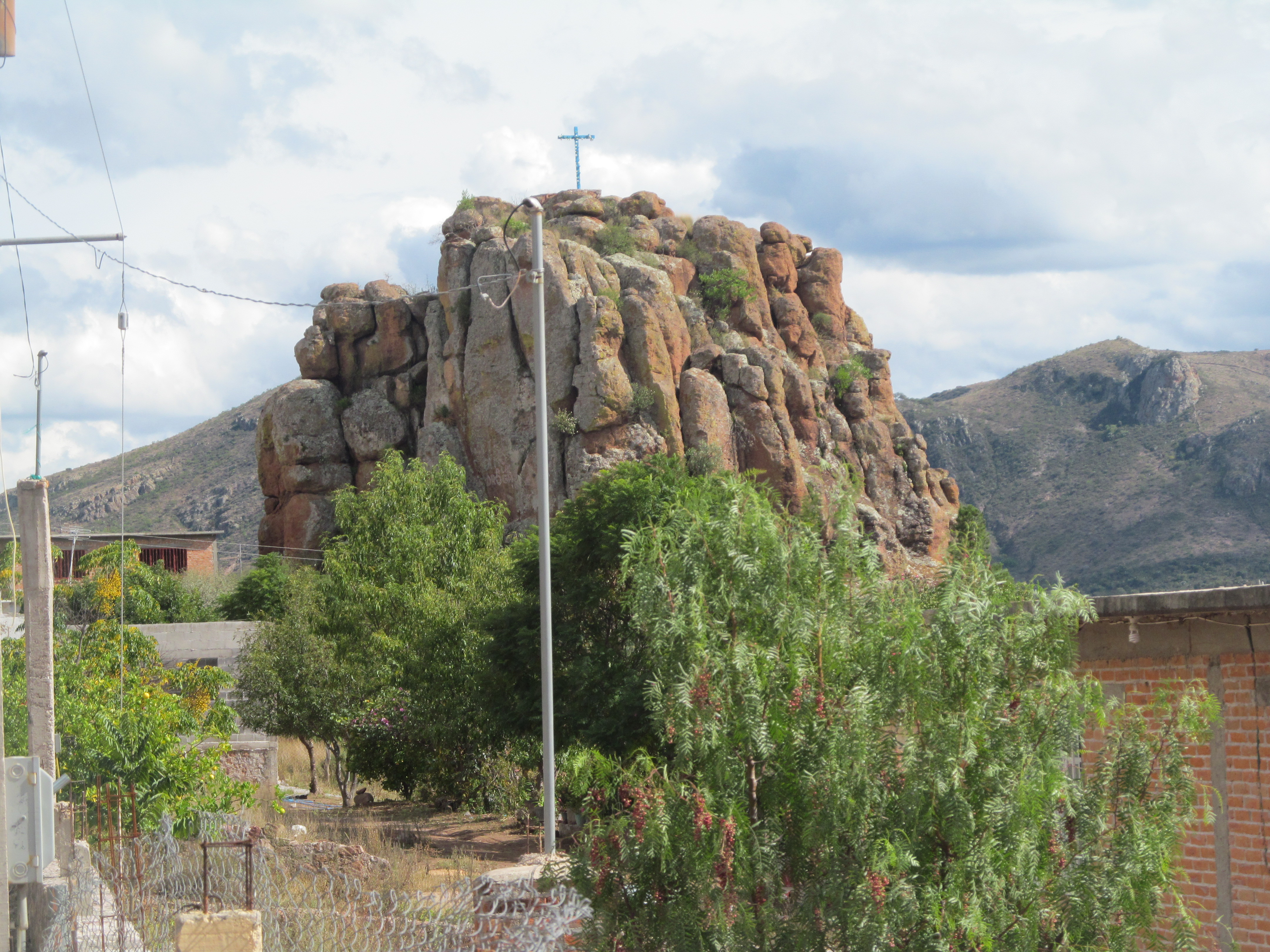 Peña de bernal de la comunidad de Bernalejo, en Santa Maria del Rio